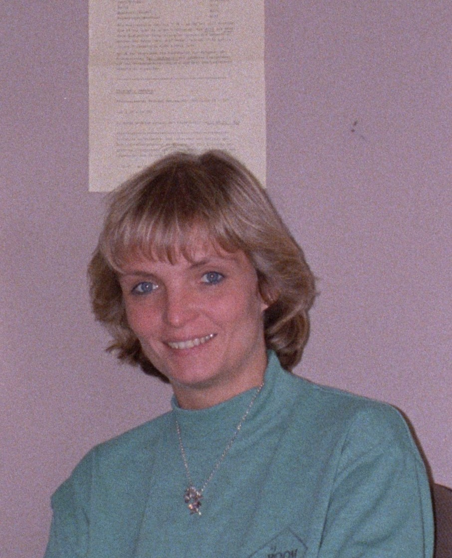 Katharina Wolkenhauer, Redakteurin und Moderatorin NDR-Fernsehen